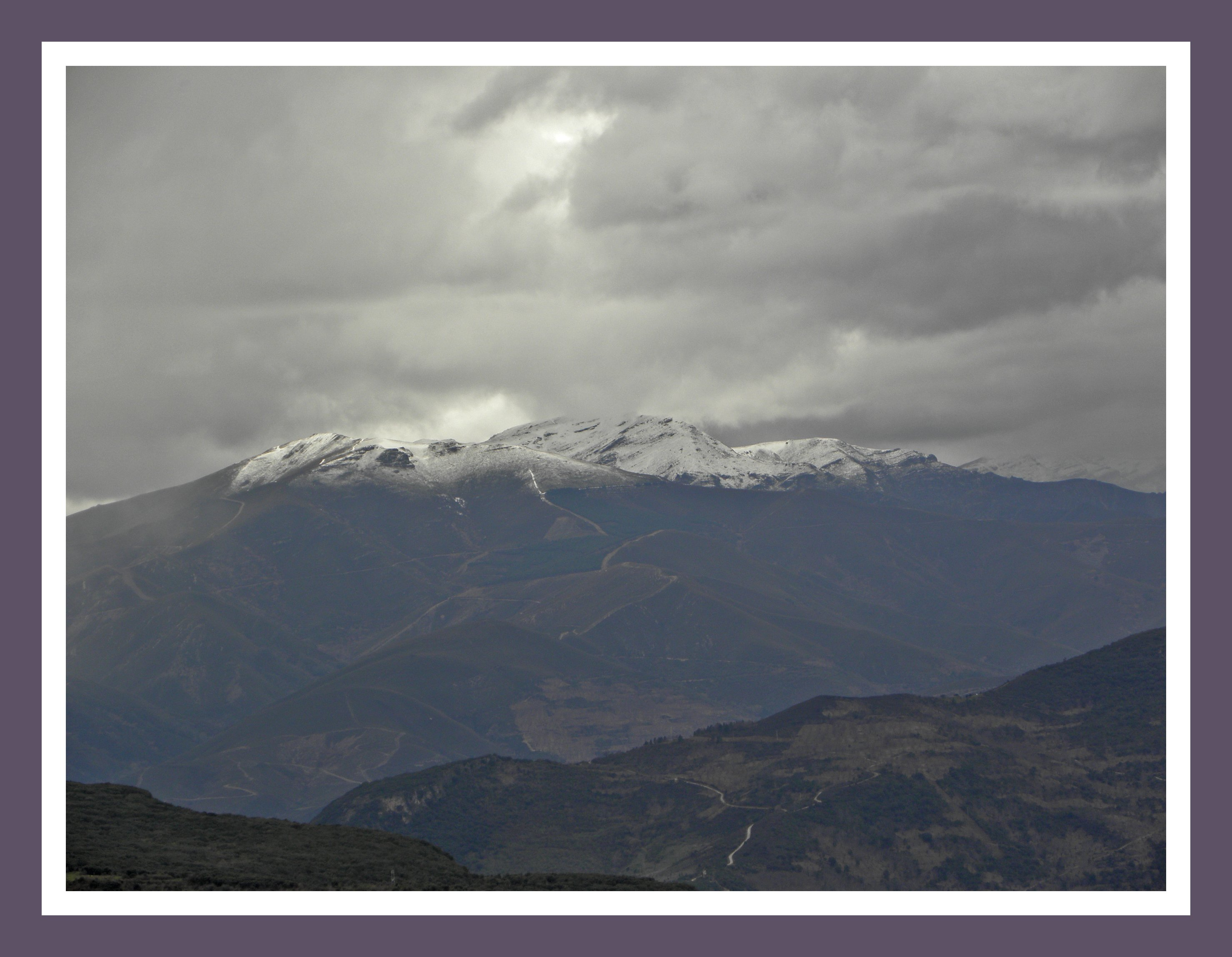 Vistas desde el mirador de Orellán, el Bierzo